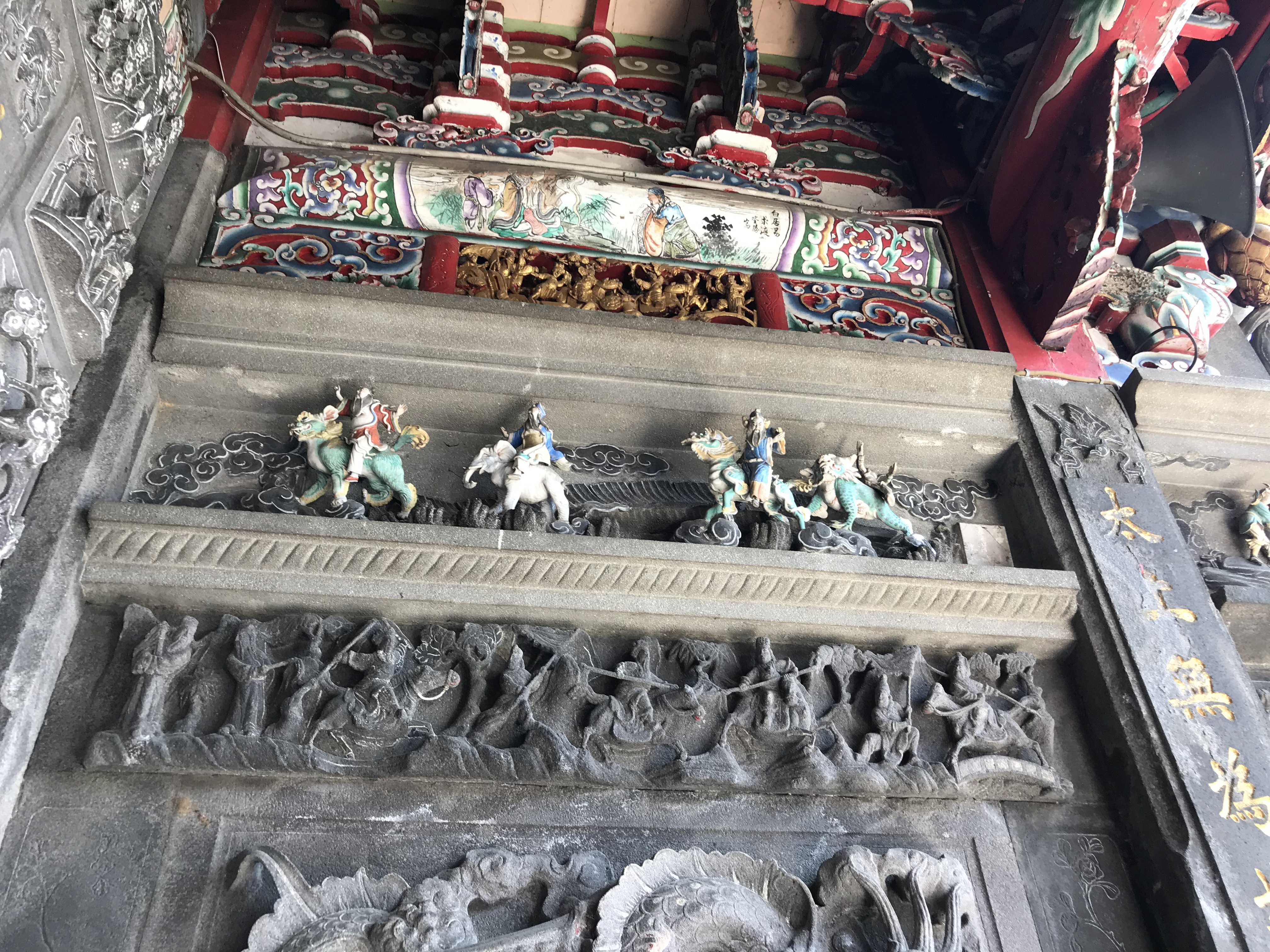 關西太和宮交趾陶